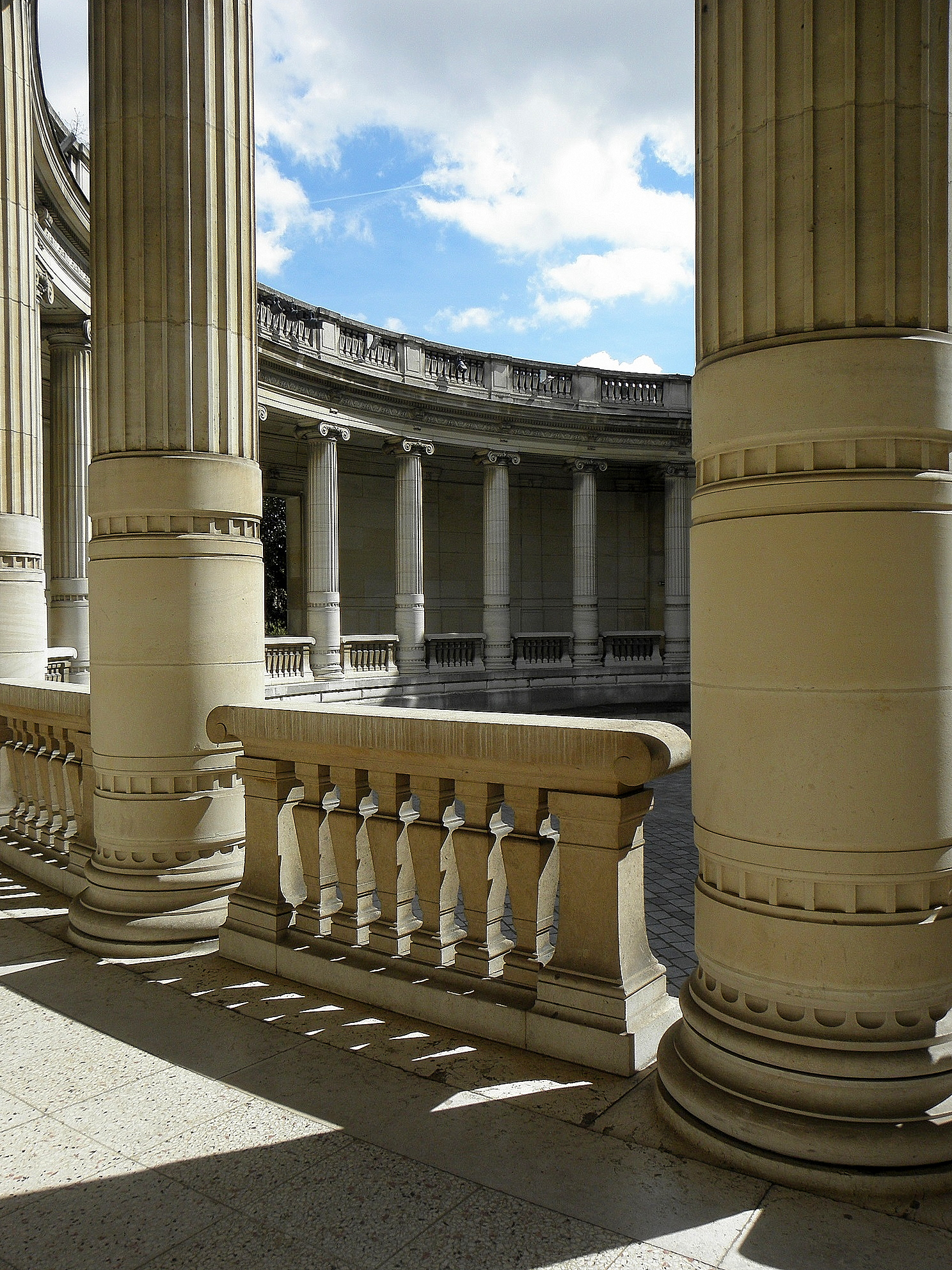 Palais Galliera. Paris 16ème (75).